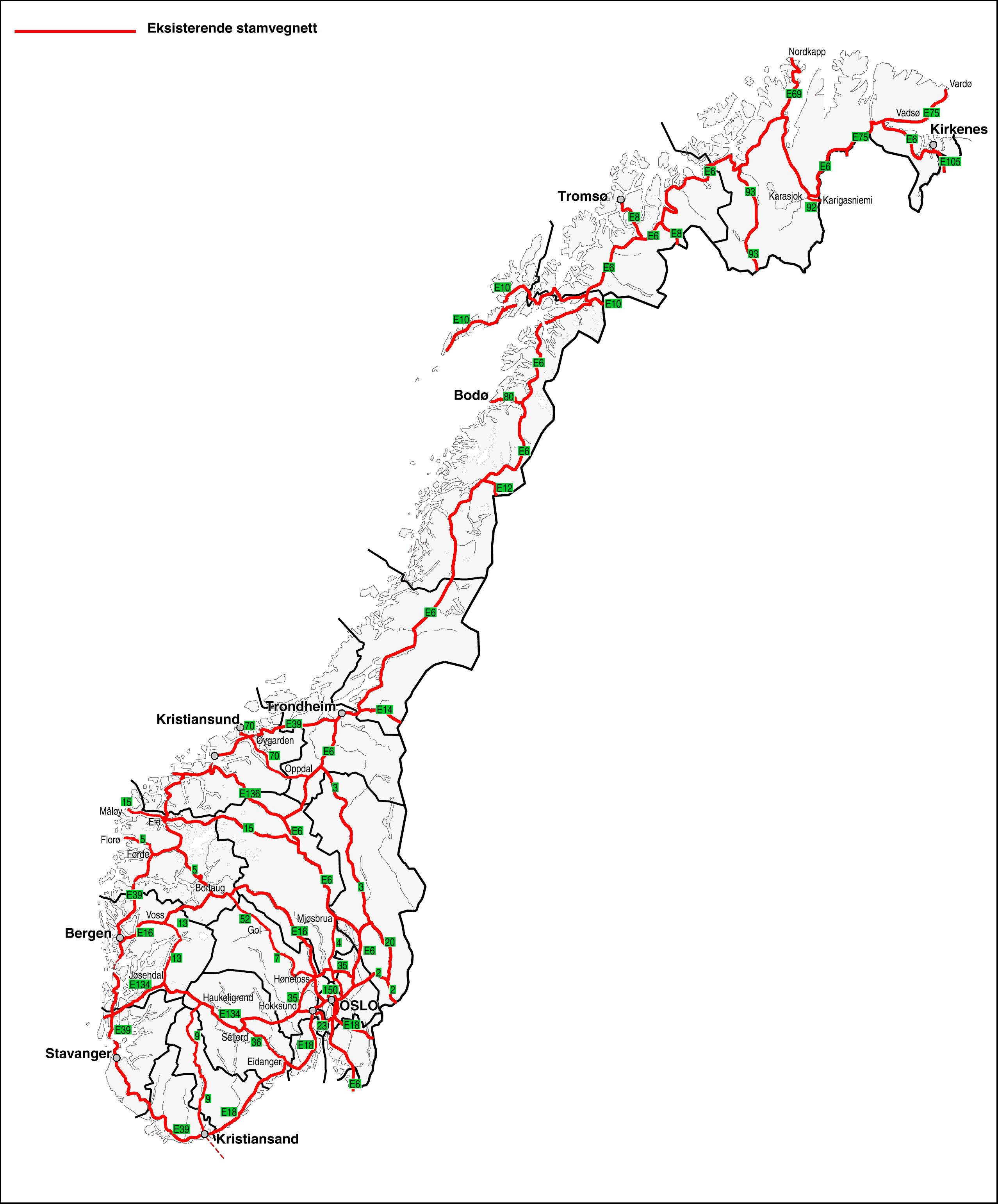 Kart over stamveinettet.